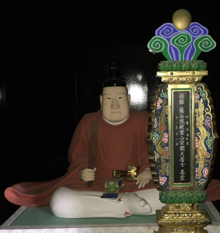 山城淀、丹後宮津藩主・永井尚征の木像。京都府宇治市宇治山田の興聖寺所蔵。